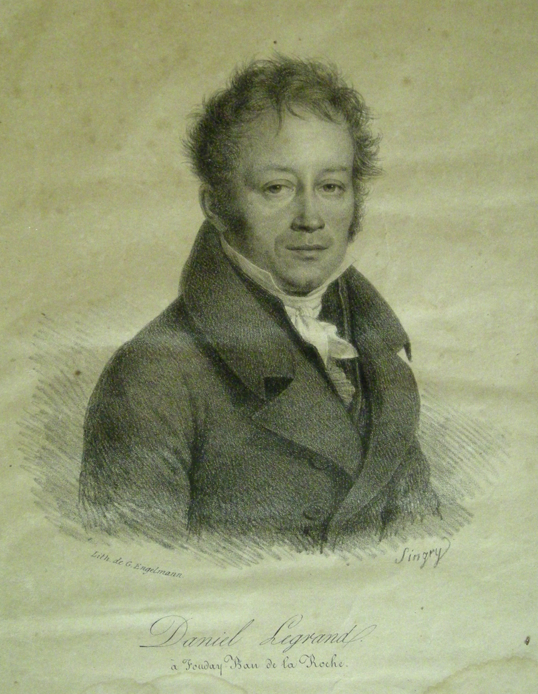 "Daniel Legrand à Fouday, Ban de la Roche", industriel et philanthrope bâlois (1783-1859).